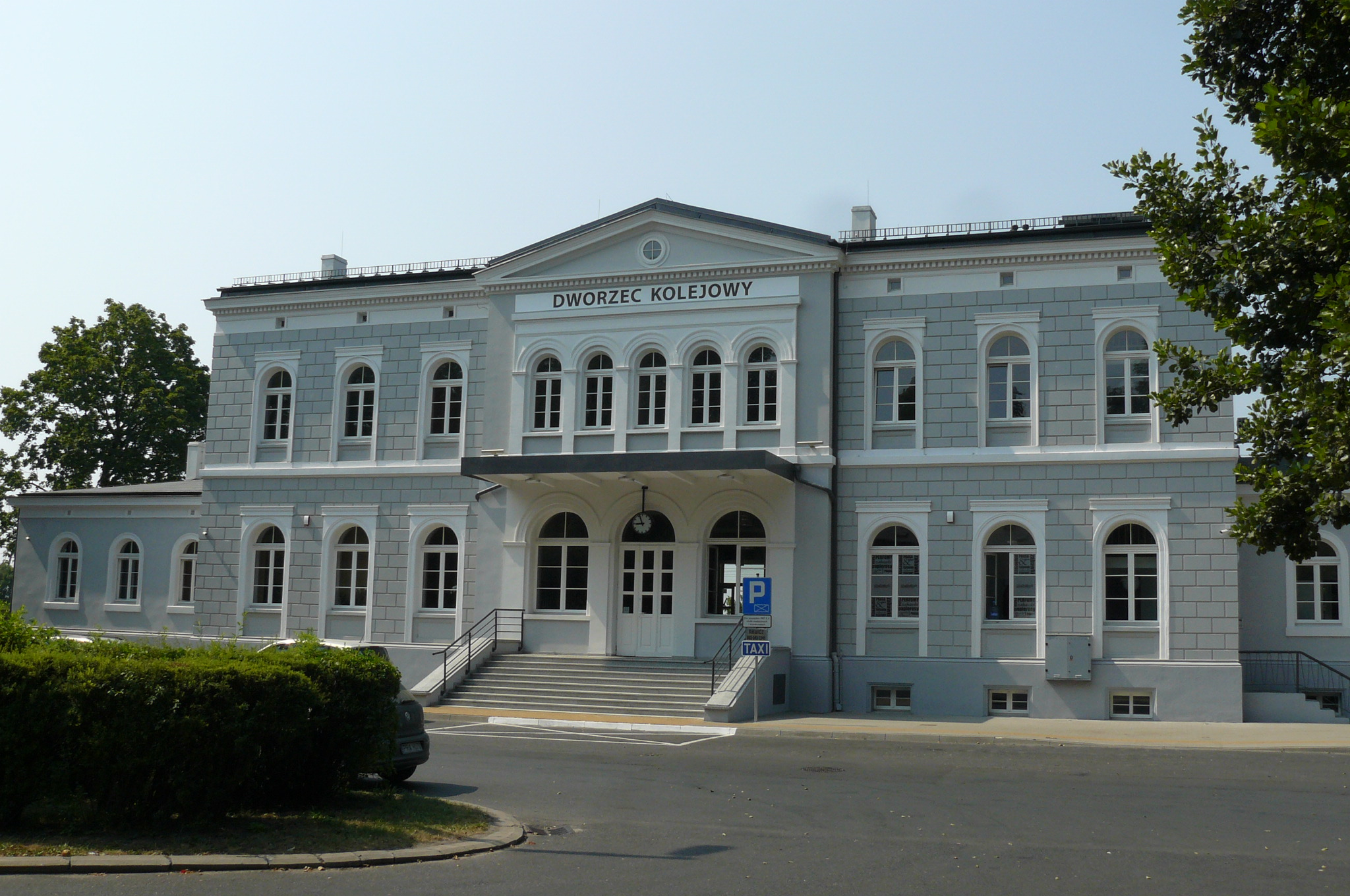 Dworzec w Rawiczu po remoncie w 2015r.